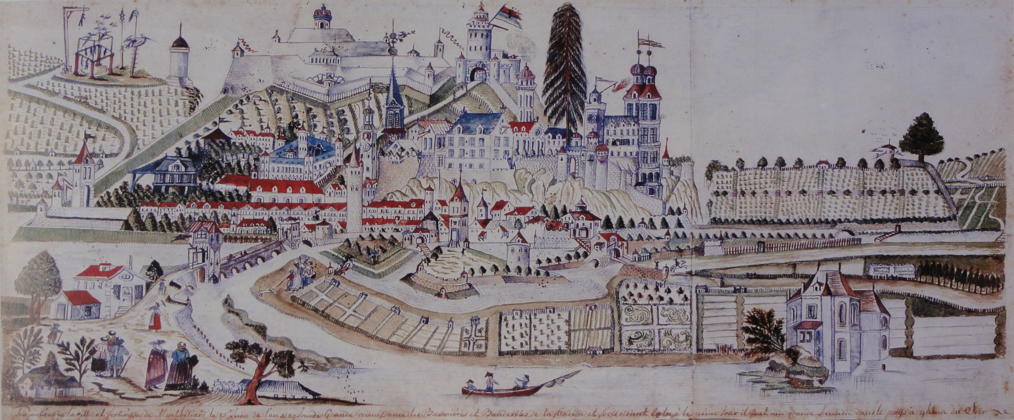 Вид на город и крепость Монбельяр в день большого праздника 15 июня 1580 года